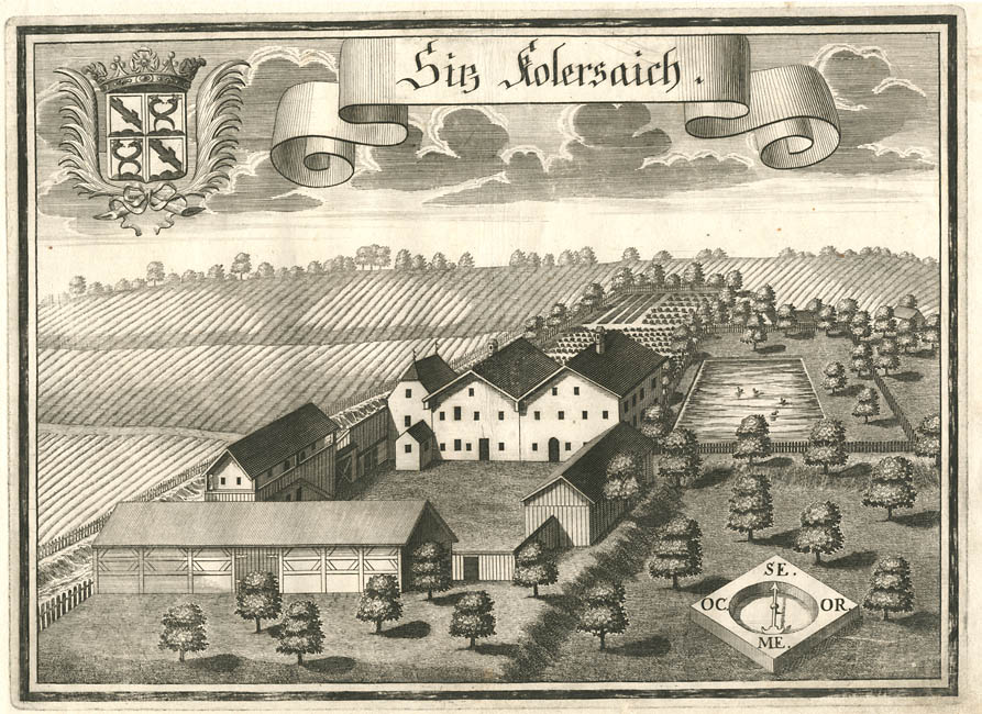 Sitz Kolersaich” (Kollersaich, Massing), aus: Beschreibung des Churfürsten- u. Hertzogthumbs Ober- und Nidern Bayrn. Rentamt Landshut. 1723